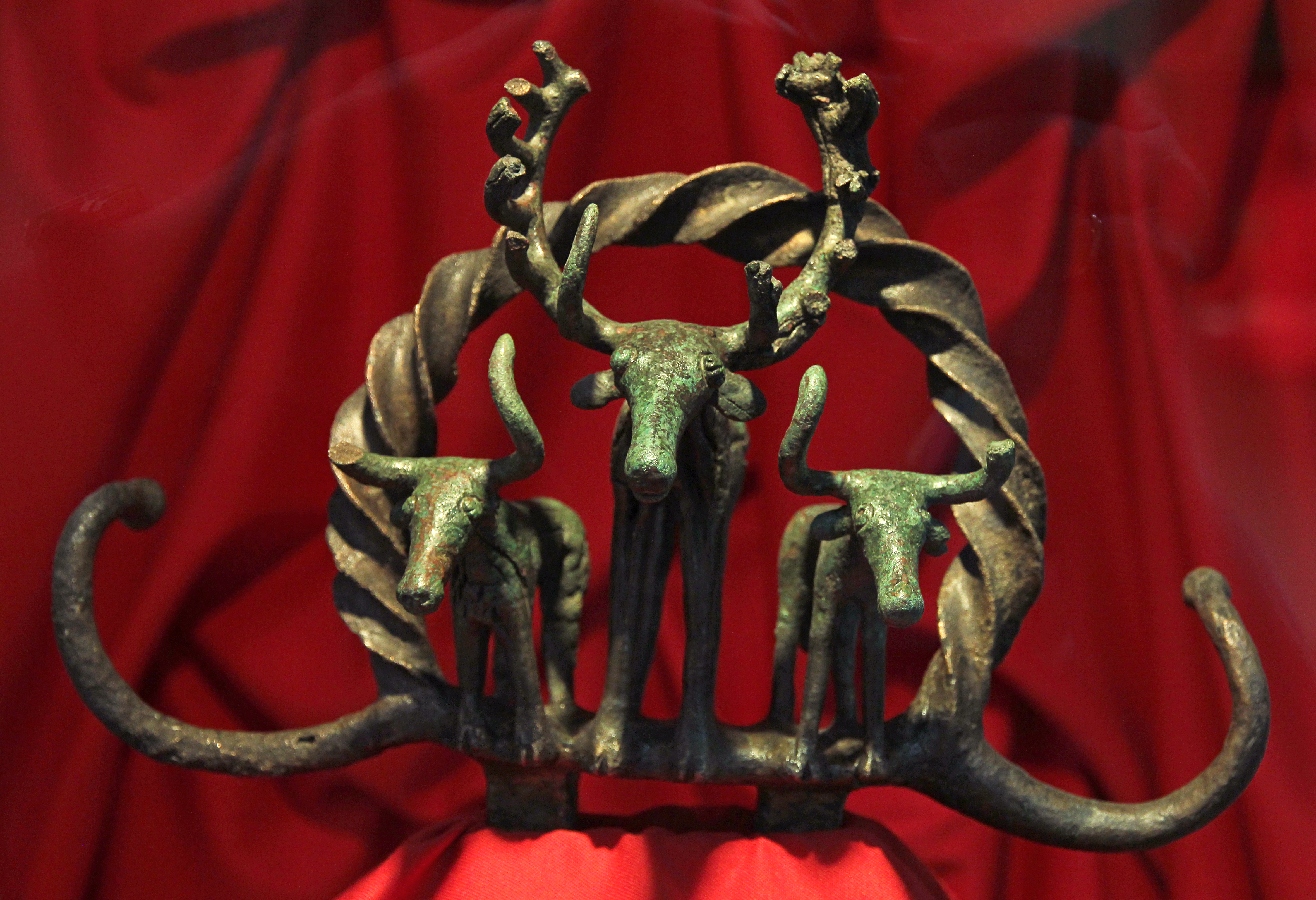 Standarte aus Alaca Höyük mit Darstellung eines Hirsches und zweier Stiere im Museum für anatolische Zivilisationen in Ankara